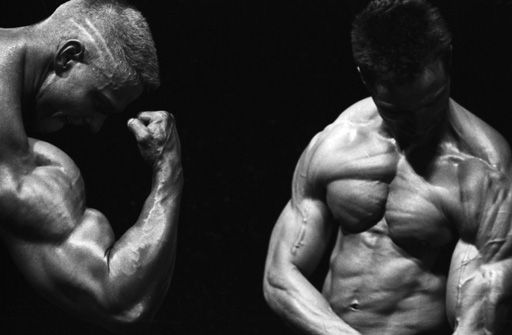 Bodybuilding-Athleten bei der Internationalen Münchner Bodybuildingmeisterschaft 1995 in der Stadthalle Germering (Bayern) am 01.10.1995